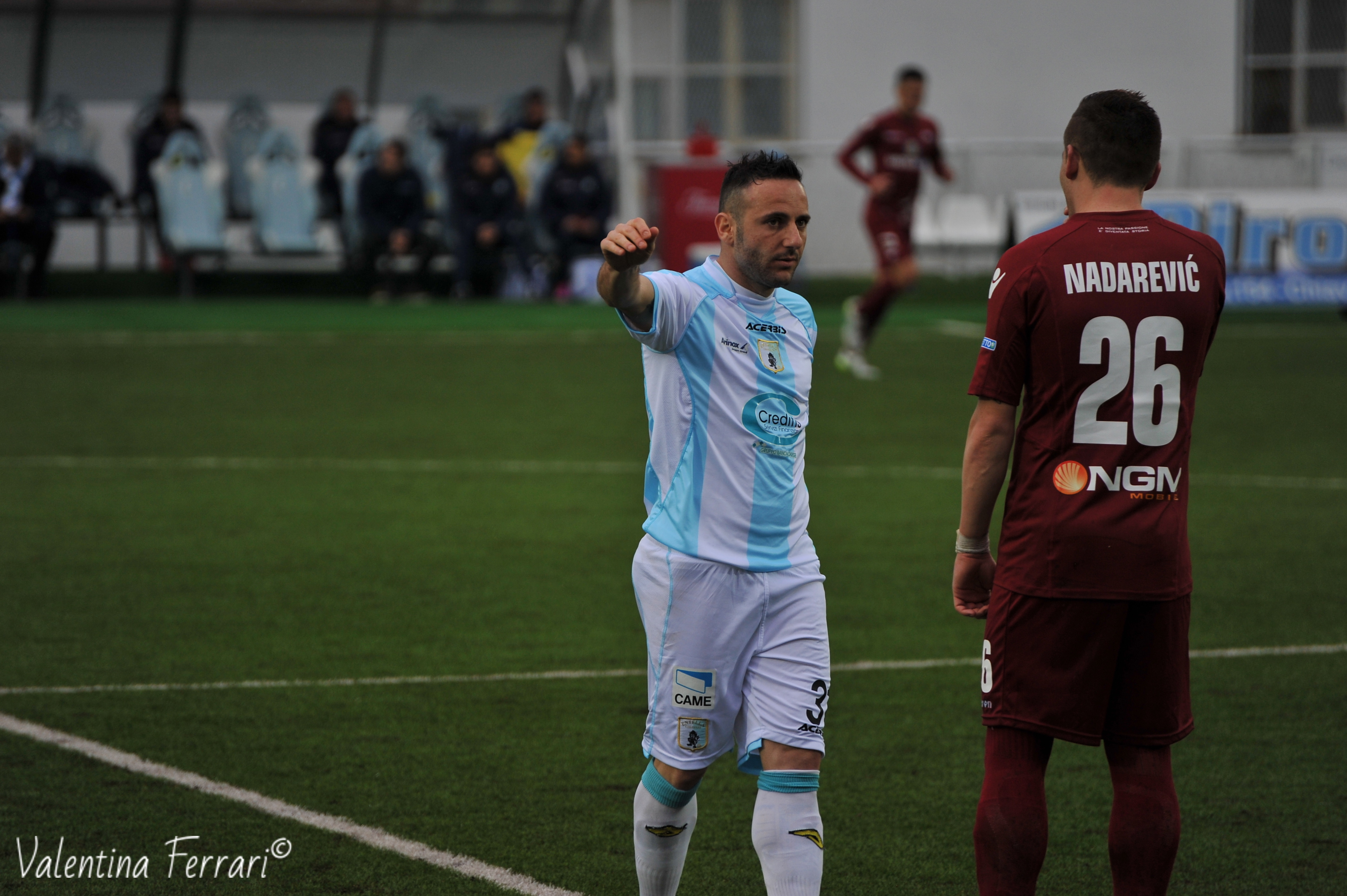 Cutolo in Entella-Trapani 1-1 del 14-2-2015